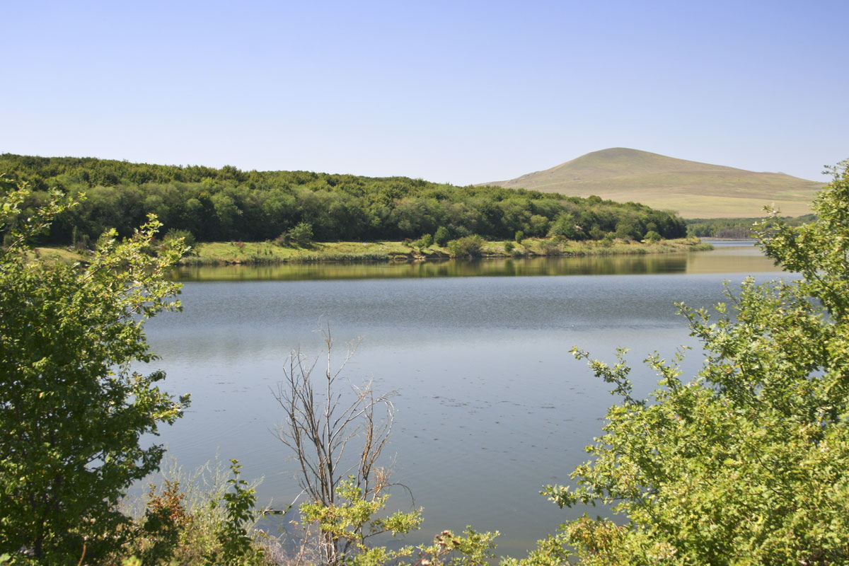 Озеро Тамбукан. Вид с восточного берега